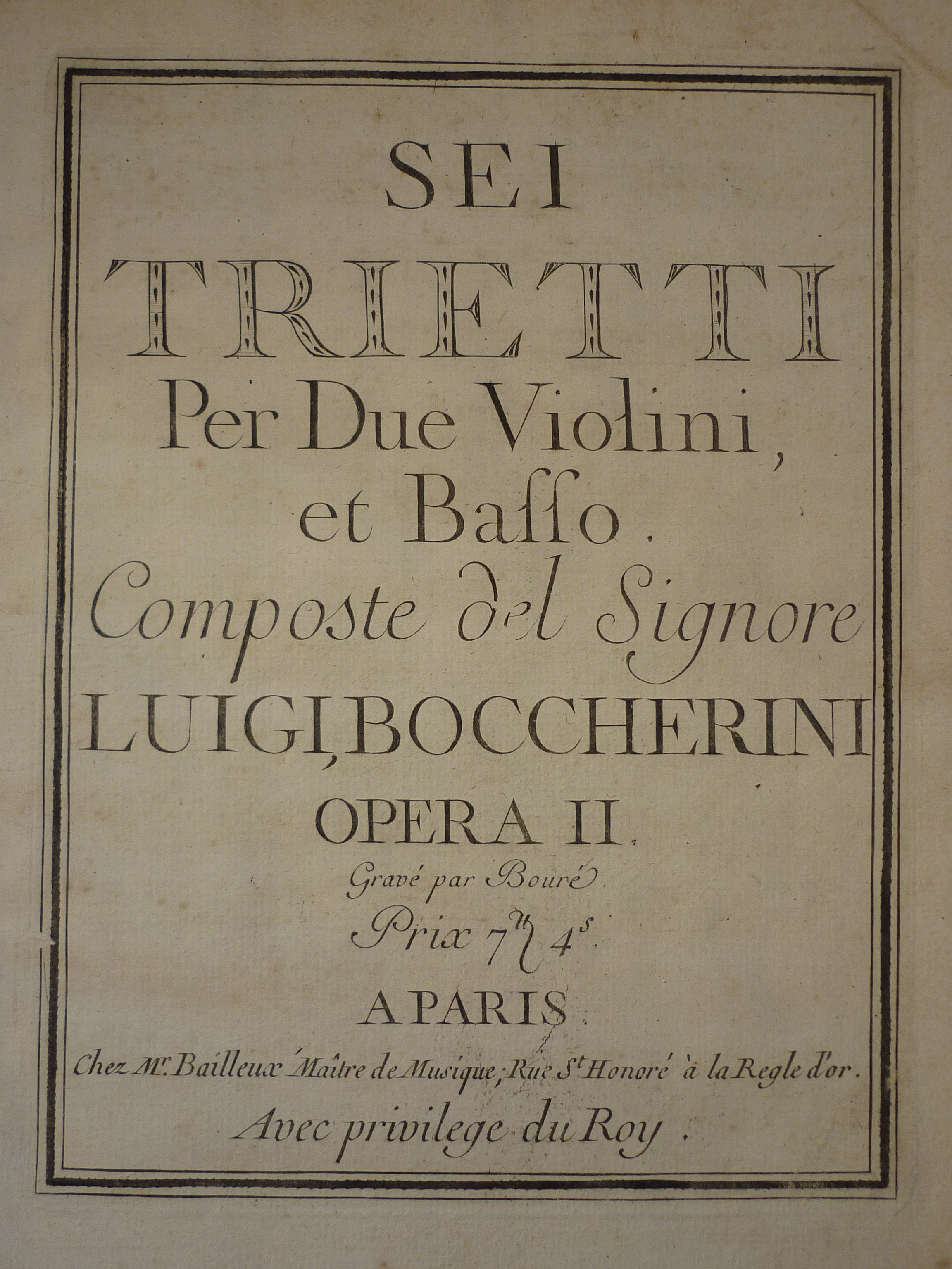 Frontispice des Six Trios pour violons et violoncelle de Boccherini opus 1, publiés par Bailleux à Paris en 1767.